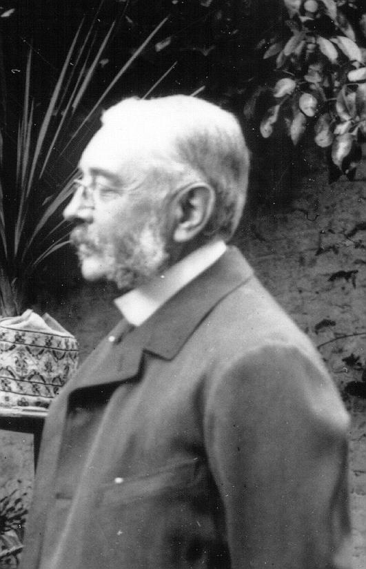 photo de Léon Philippe van Dievoet, né à Bruxelles le 5 février 1838 et décédé à Forest le 26 juin 1908, époux de Hermine Sraatman. Hermine (Mina) Henriette STRAATMAN, née à Bruxelles le 25 septembre 1838, décédée à Saint-Gilles le 21 février 1917, épousa à Bruxelles le 3 décembre 1867, Léon Philippe VAN DIEVOET, armateur, commissionnaire-expéditeur par eau (associé de Lambert Straatman), né à Bruxelles le 5 février 1838 et décédé à Forest le 26 juin 1908, fils d’Eugène et d’Hortense Poelaert (soeur du célèbre architecte), petit-fils de Jean-Louis et de Jeanne Wittouck, arrière-petit-fils de Jean-Baptiste et de Anne-Marie Lambrechts, arrière-arrière-petit-fils de Jean-Baptiste et d’Elisabeth van der Meulen, arrière-arrière-arrière-petit-fils de Jean-Baptiste van Dievoet, négociant en vins, né à Bruxelles le 6 mars 1663, et de Anne van der Borcht.